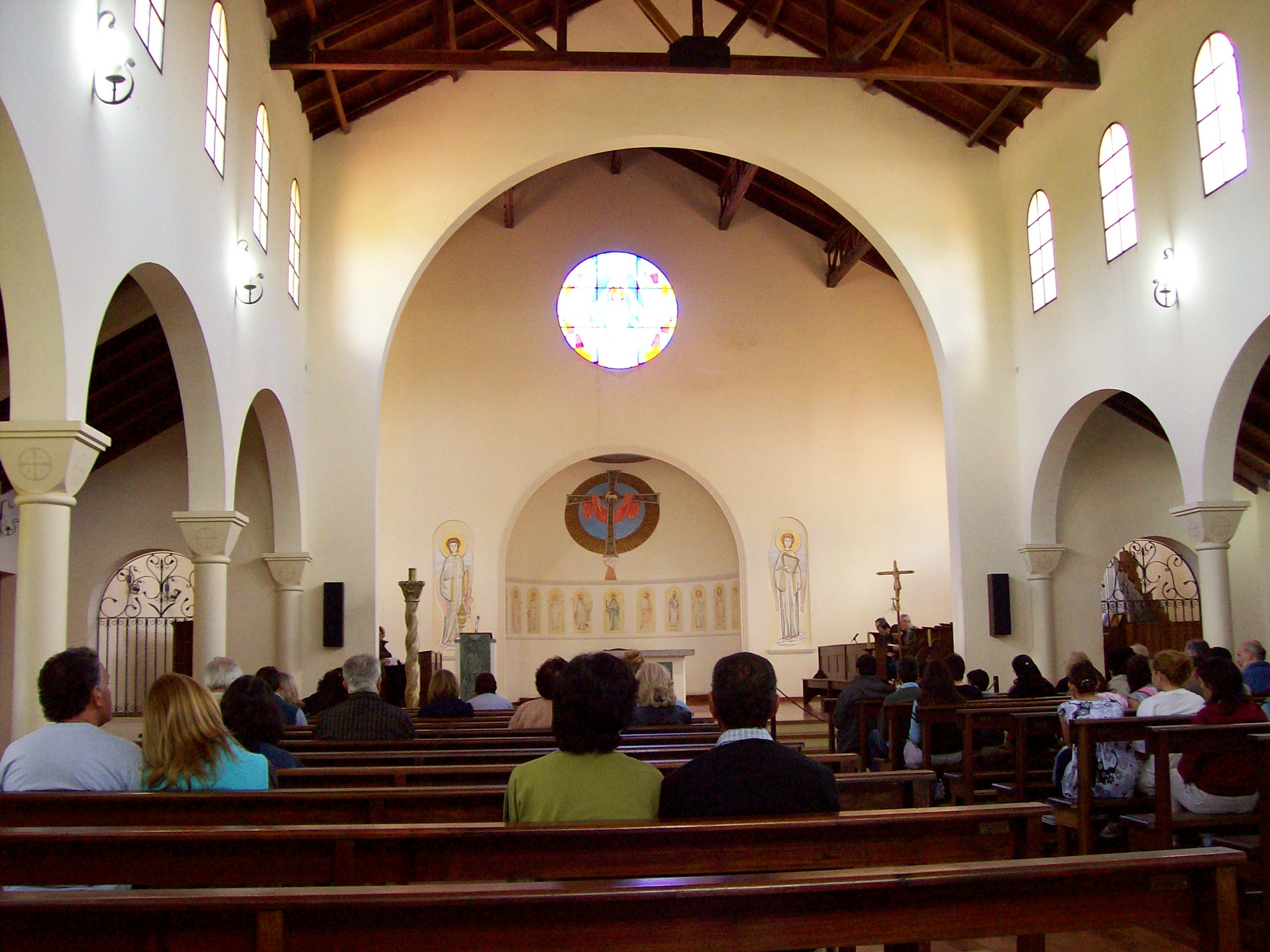 Religious ceremony held at Abadía Benedictina del Niño Dios, Victoria, Entre Ríos, Argentina.